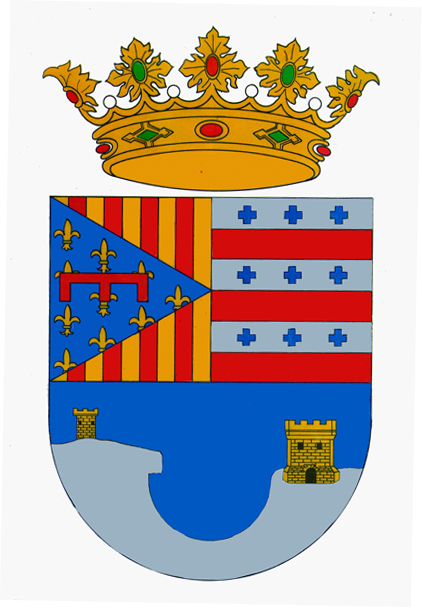 Escut de Teulada (la Marina Alta)